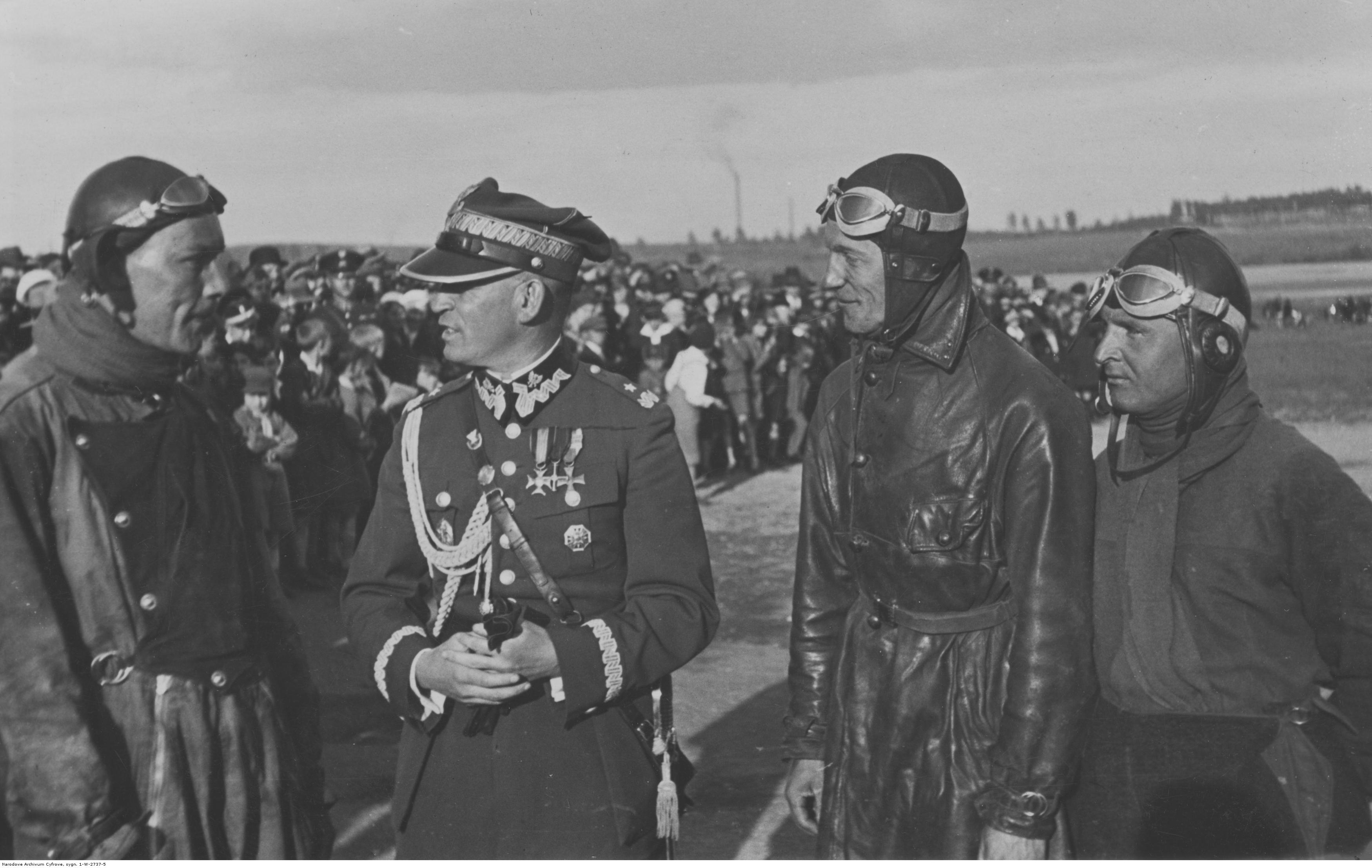 Tydzień Ligi Obrony Powietrznej i Przeciwgazowej w Katowicach. Gen. Józef Zając wśród pilotów z tzw. "trójki Bajana". Od lewej: por. Bronisław Kosiński, gen. Józef Zając, kpr. Karol Pniak, kpr. Stanisław Macek. Koncern Ilustrowany Kurier Codzienny - Archiwum Ilustracji. Sygnatura: 1-W-2737-5